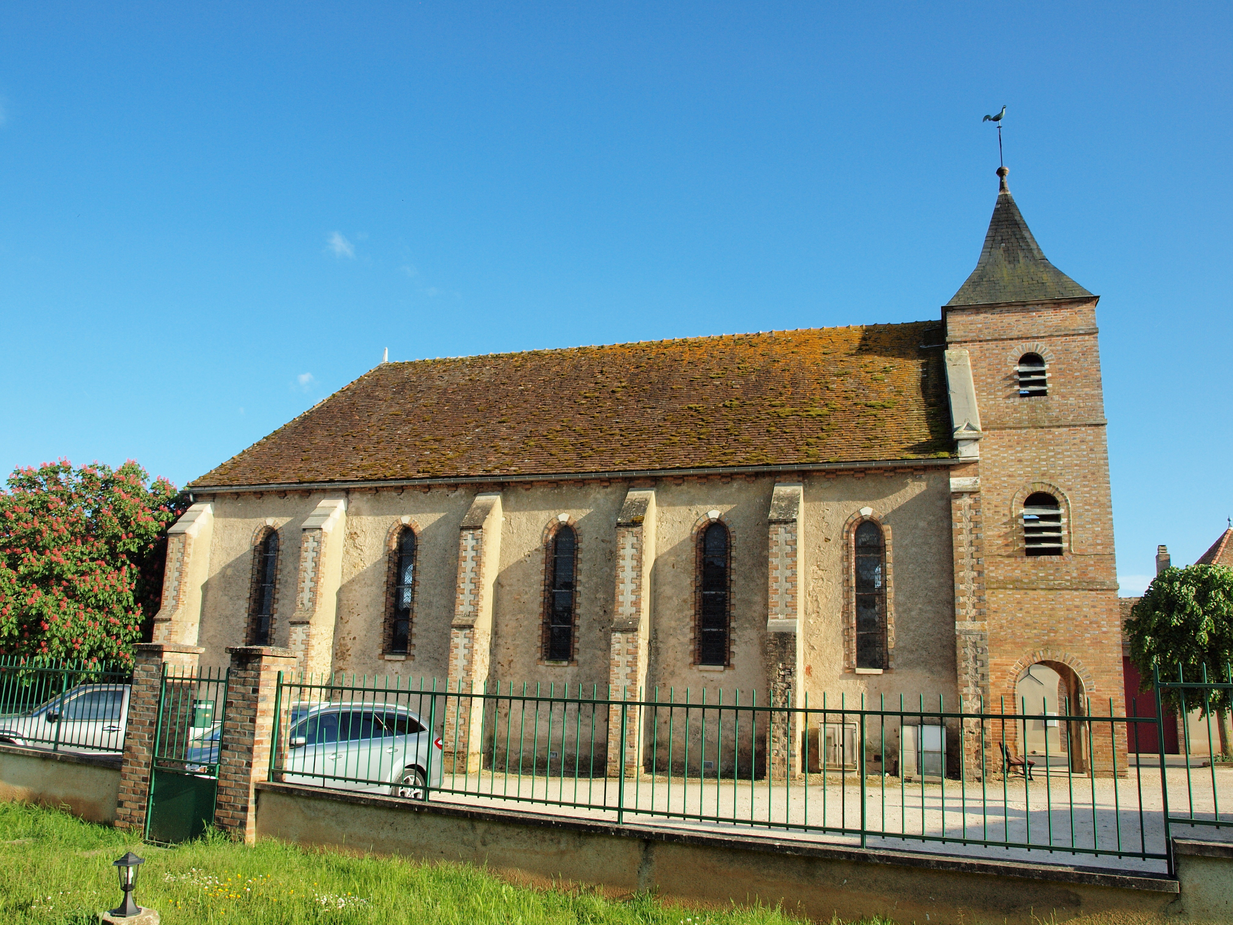 Église Saint Sérotin de Saint-Sérotin (Yonne, France)